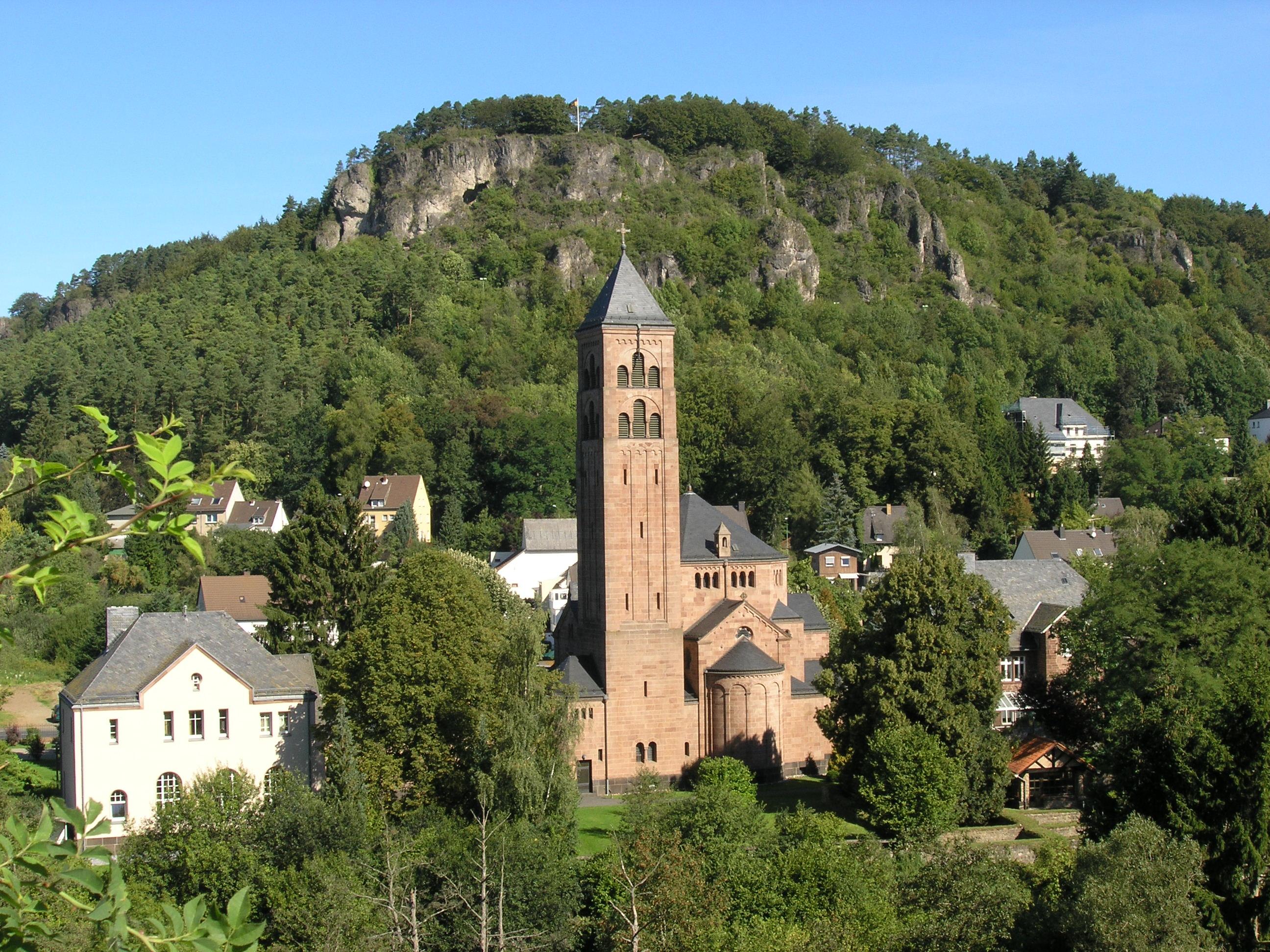 Erlöserkirche Gerolstein mit Munterlay